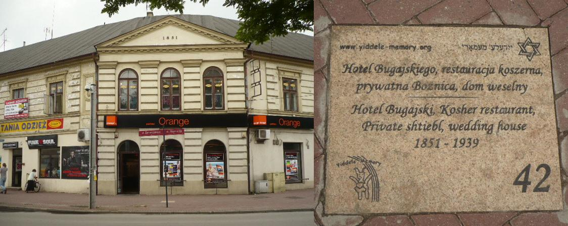 Radomsko. Otwarte Muzeum Żydowskie 42